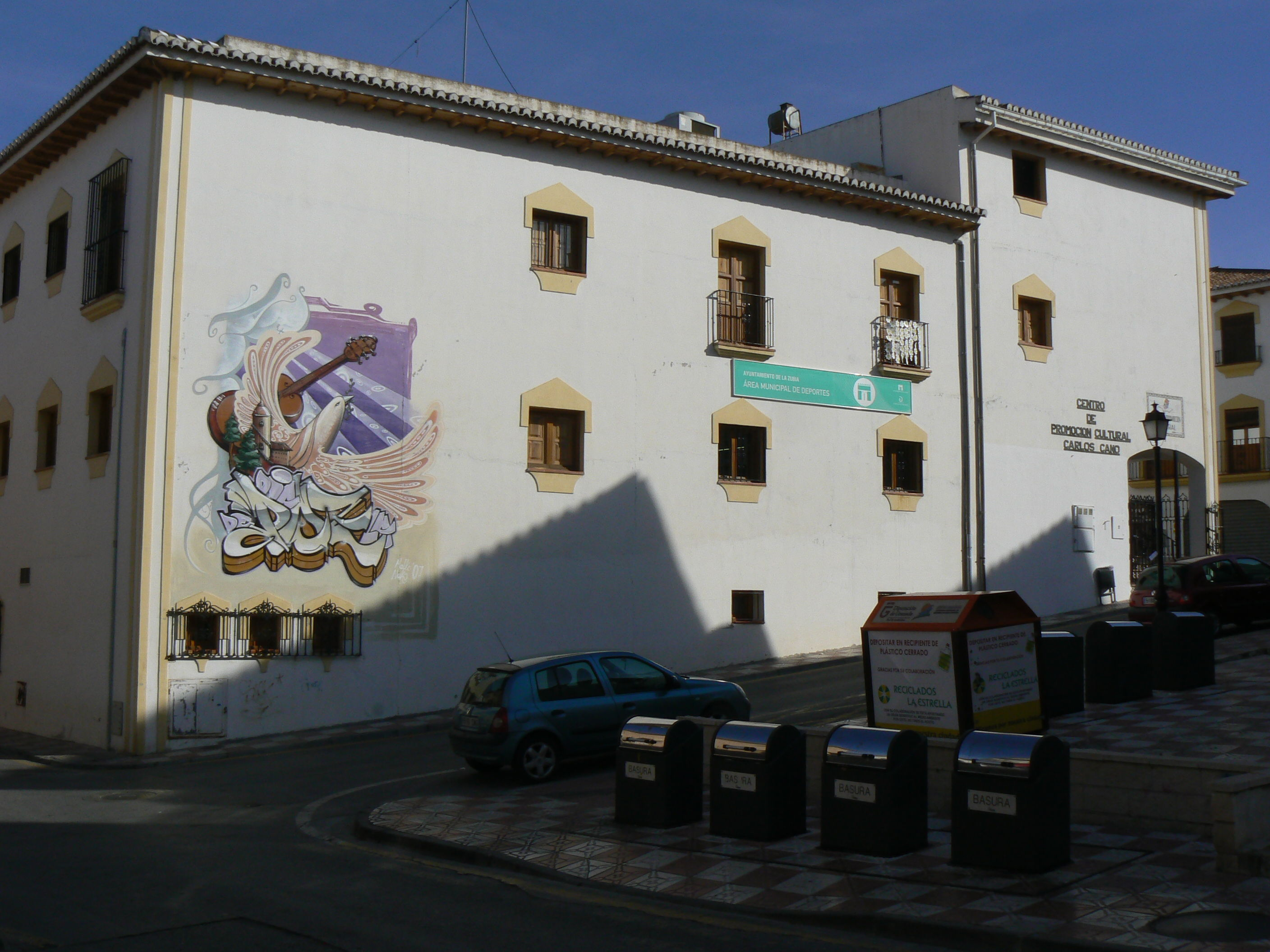 En el Centro Cultural Carlos Cano se realizan actividades culturales variadas. Suele concentrar gran parte de las llamadas "actividades extraescolares" donde las madres inscriben a sus niños (o ellos mismos lo hacen cuando son más mayores) pero no solo hay actividades para jóvenes. Cuenta con un "Salón de Actos" donde se llevan a cabo actos oficiales. Además se representan obras de teatro, bien realizadas por profesionales o bien por los jóvenes colegiales cuyos profesores les han ayudado a preparar el "teatro de fin de curso".